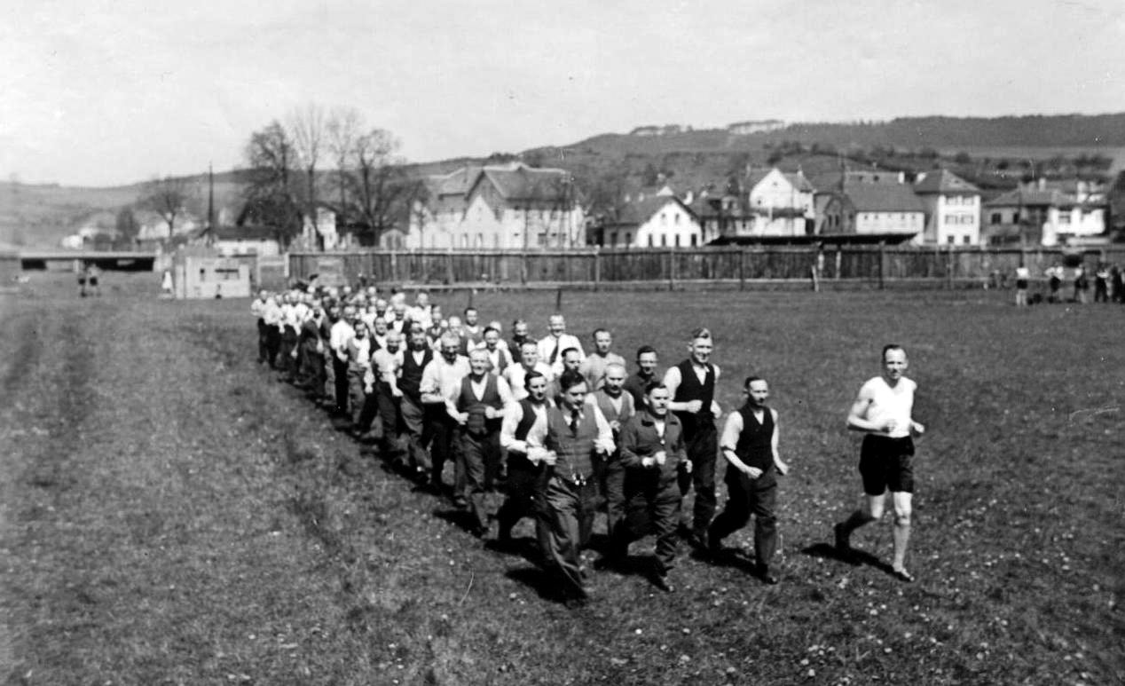 Betriebssport der Obermain-Schuhfabrik auf den Wiesen vor der Stadt. Im Hintergrund ist der Bretterzaun des Fußballplatzes zu erkennen.